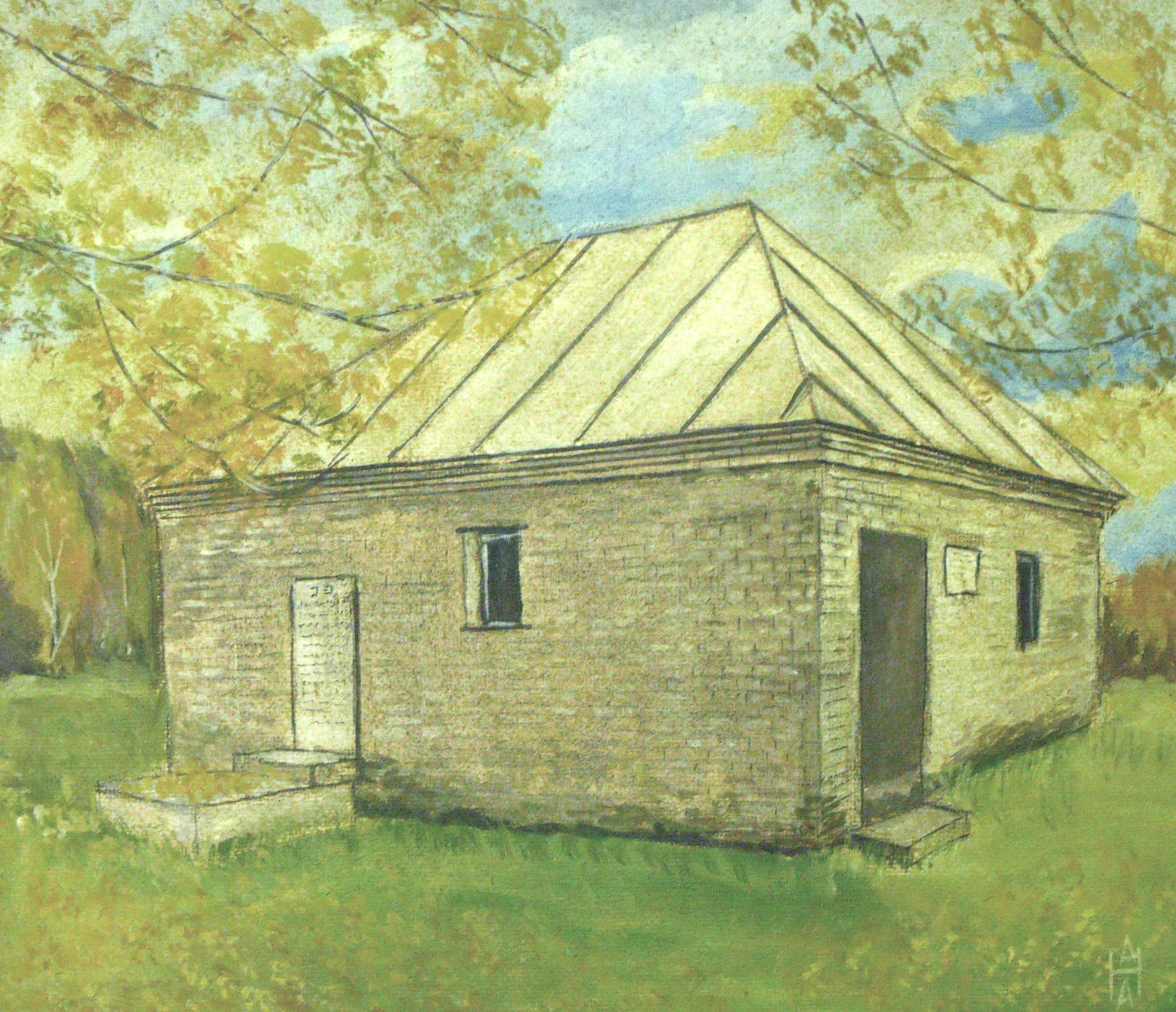 Ляды (Дубровенский район Витебской области). Усыпальница Шнеерсона. Яичная темпера. ДВП. Художник Анатолий Александрович Наливаев.